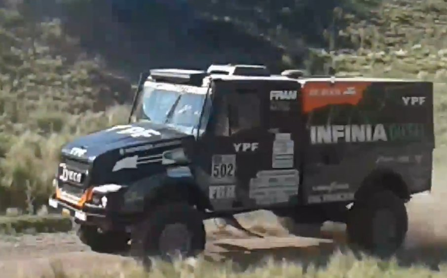 Dakar 2017. Tucumán (Argentina). Captura de La Gaceta (Mirá las máquinas del Dakar en su paso por Tucumán). Federico Villagra (Iveco).